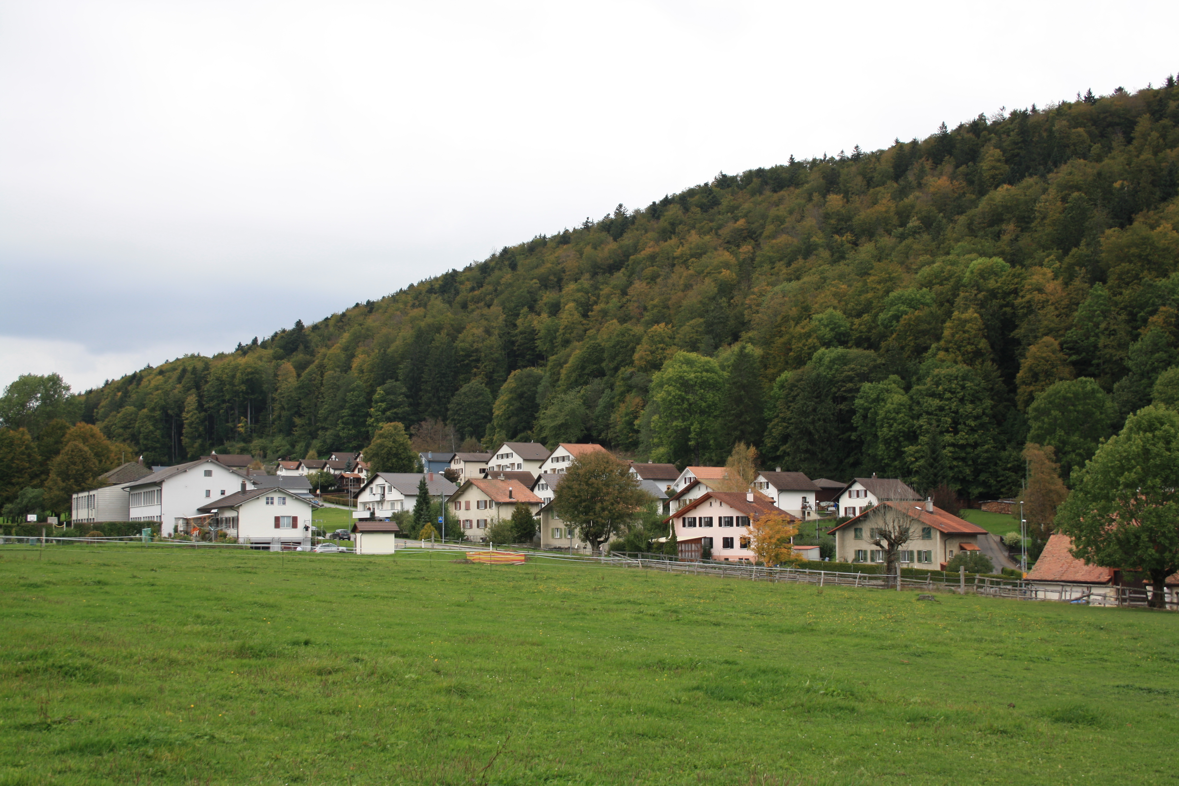 Blick auf Bellelay